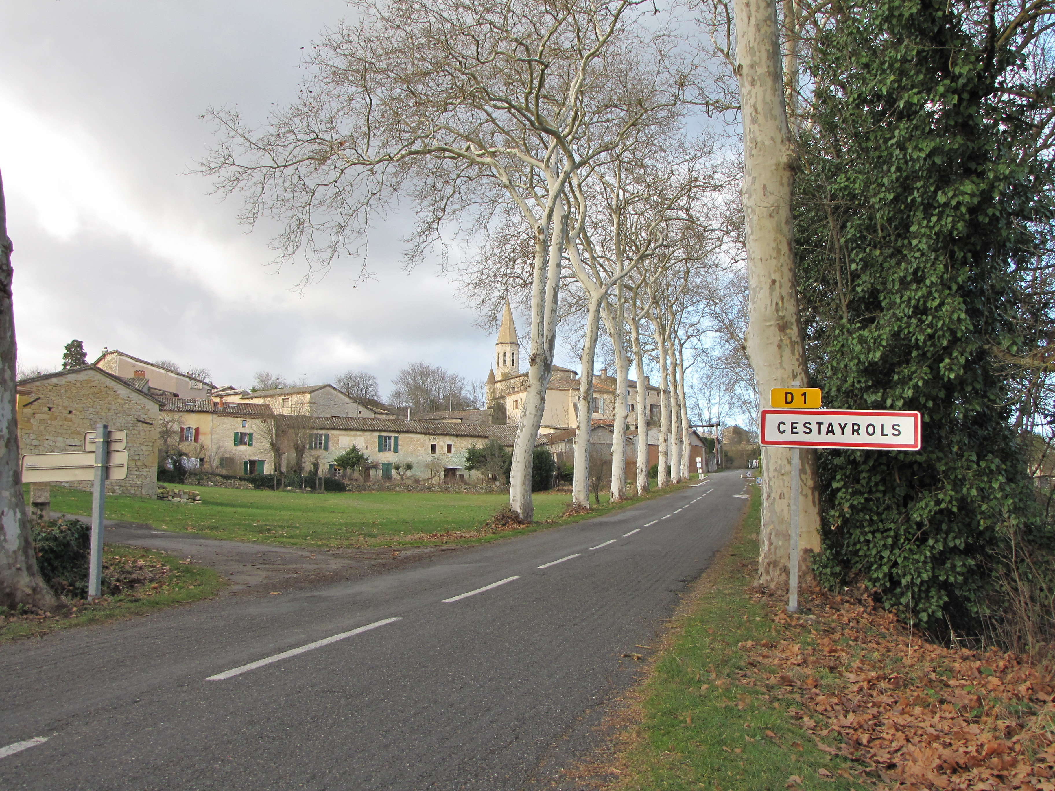 Cestayrols entrée du village